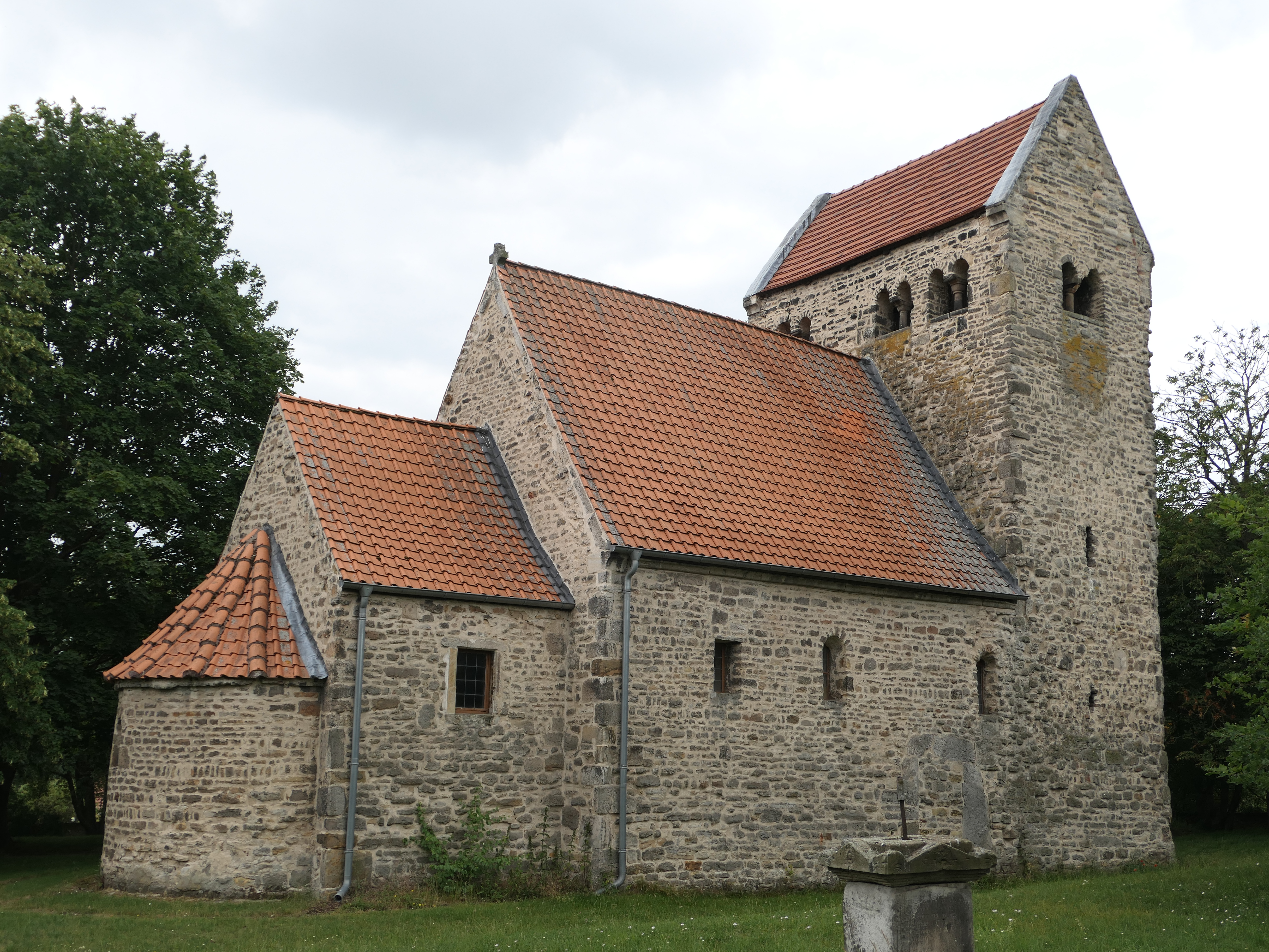 Seehausen (Börde) St. Paulskirche N